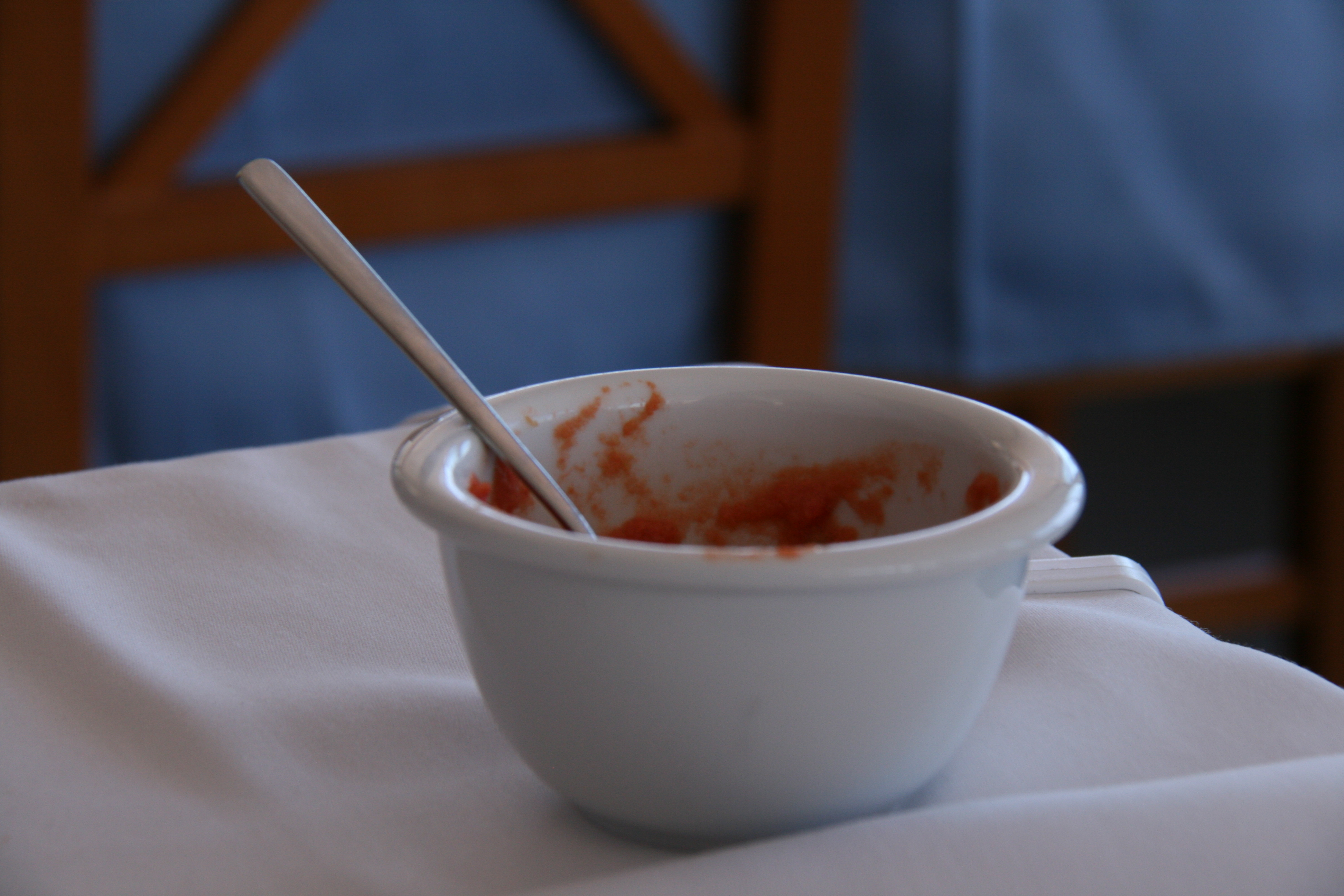 Salsero con salsa de tomate